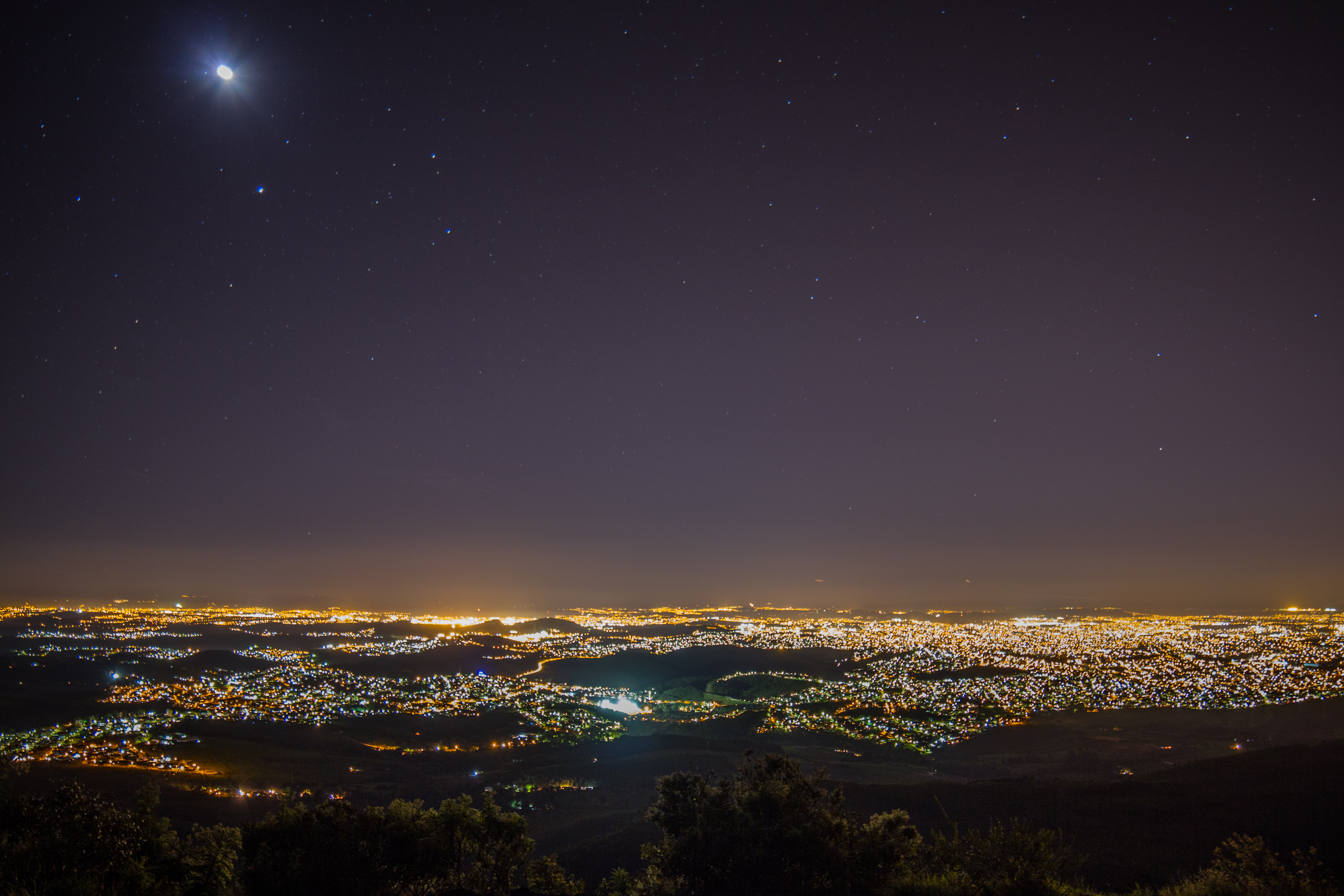 Vista noturna do mirante da Serra do Rola Moça.